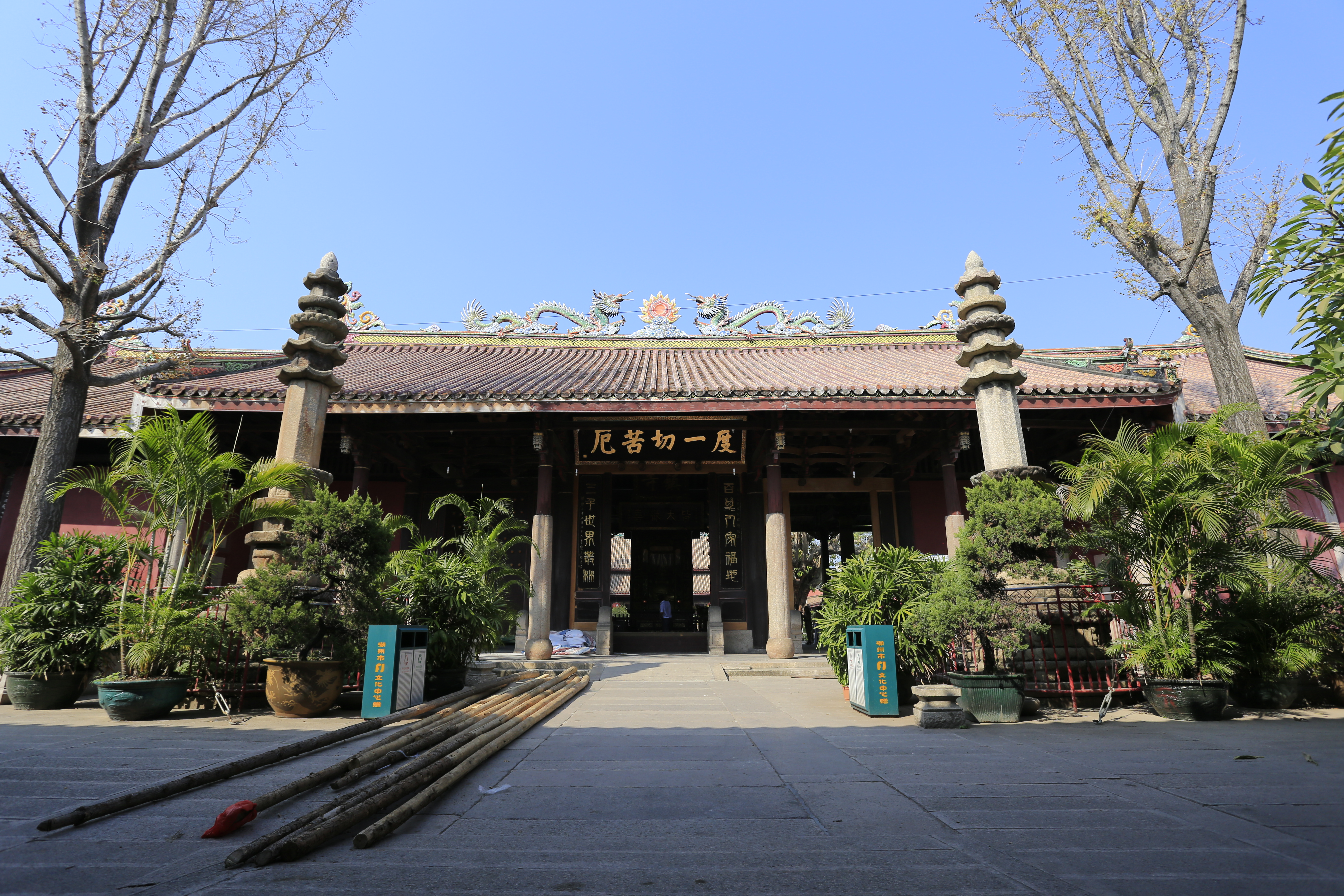 潮州开元寺 天王殿